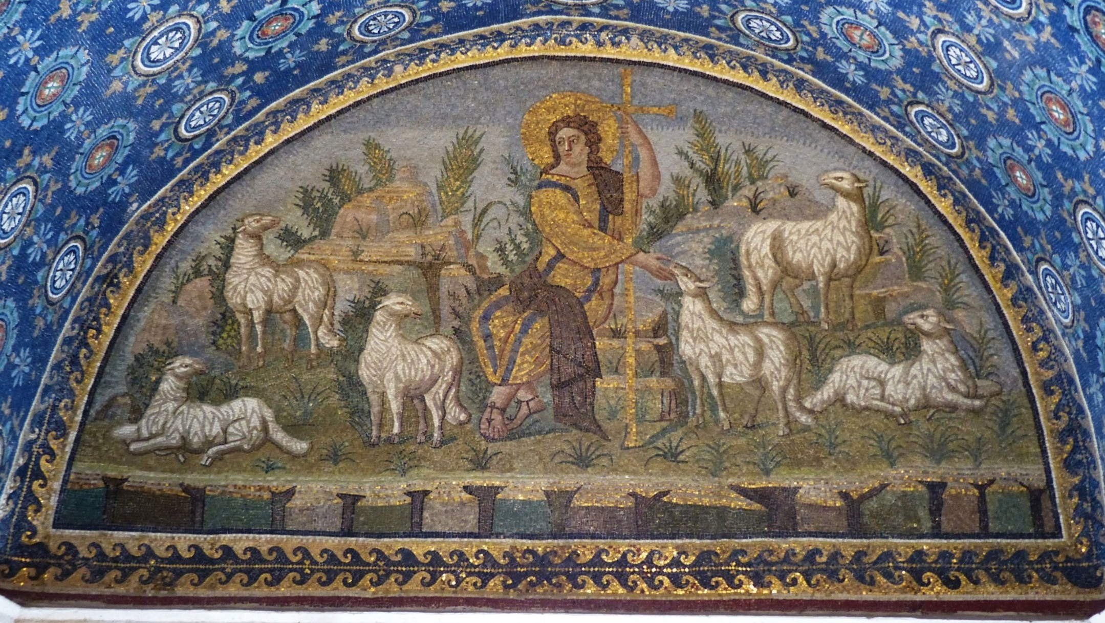 Der äußerlich unscheinbare Kirchenbau wurde von der 450 verstorbenen Kaiserin zu ihren Lebzeiten veranlasst und vollendet. Dass er als ihr Mausoleum gedacht war, muss dahingestellt bleiben, begraben wurde sie dort aller Wahrscheinlichkeit nach nicht. Die kleine Kirche wurde vielmehr dem Hl. Laurentius gewidmet. Das Mosaik auf dem Bild nimmt Bezug auf die biblische Aussage vom "Guten Hirten". Die zackigen Einschnitte im Bildvordergrund unten sind wohl als Felsabstürze zu deuten.